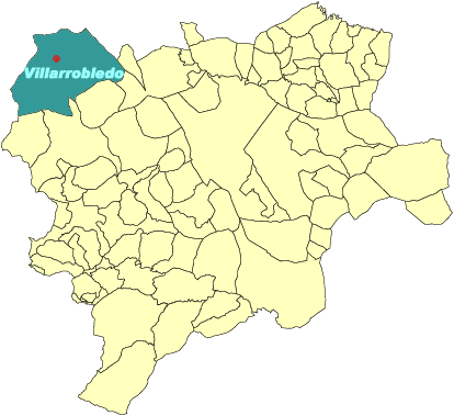 Ubicación del Término Municipal de Villarrobledo dentro de la Provincia de Albacete.